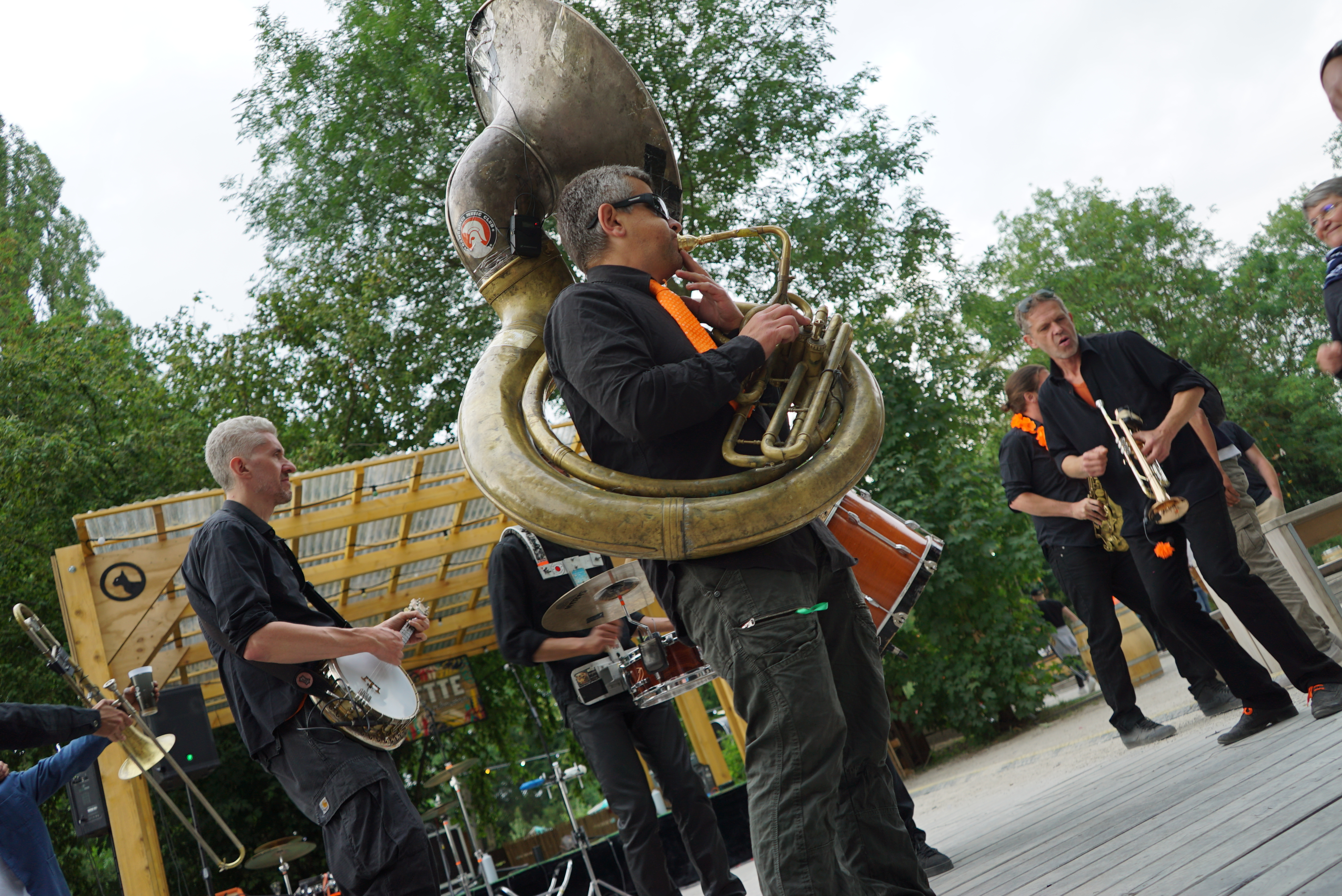 en concert à Reims.